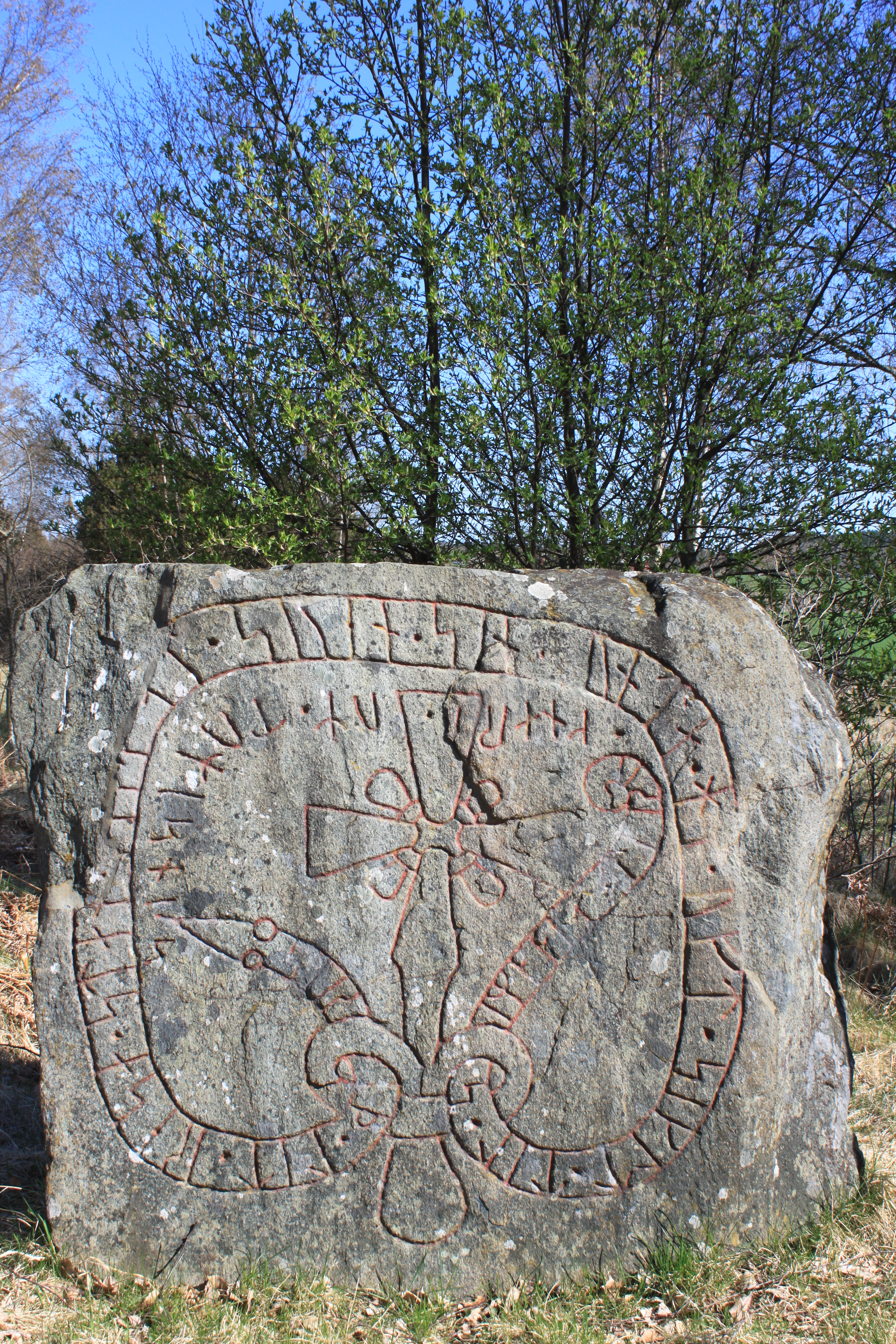 Ytterselö 92:2 (Sö 198). Runristning. Fast fornlämning.